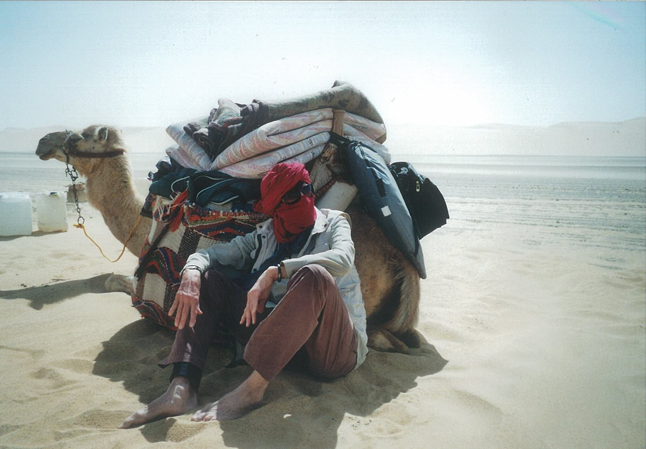 Rast 2011 in der Großen Sandwüste/Ägypten auf dem alten Karawanenweg in den Sudan.